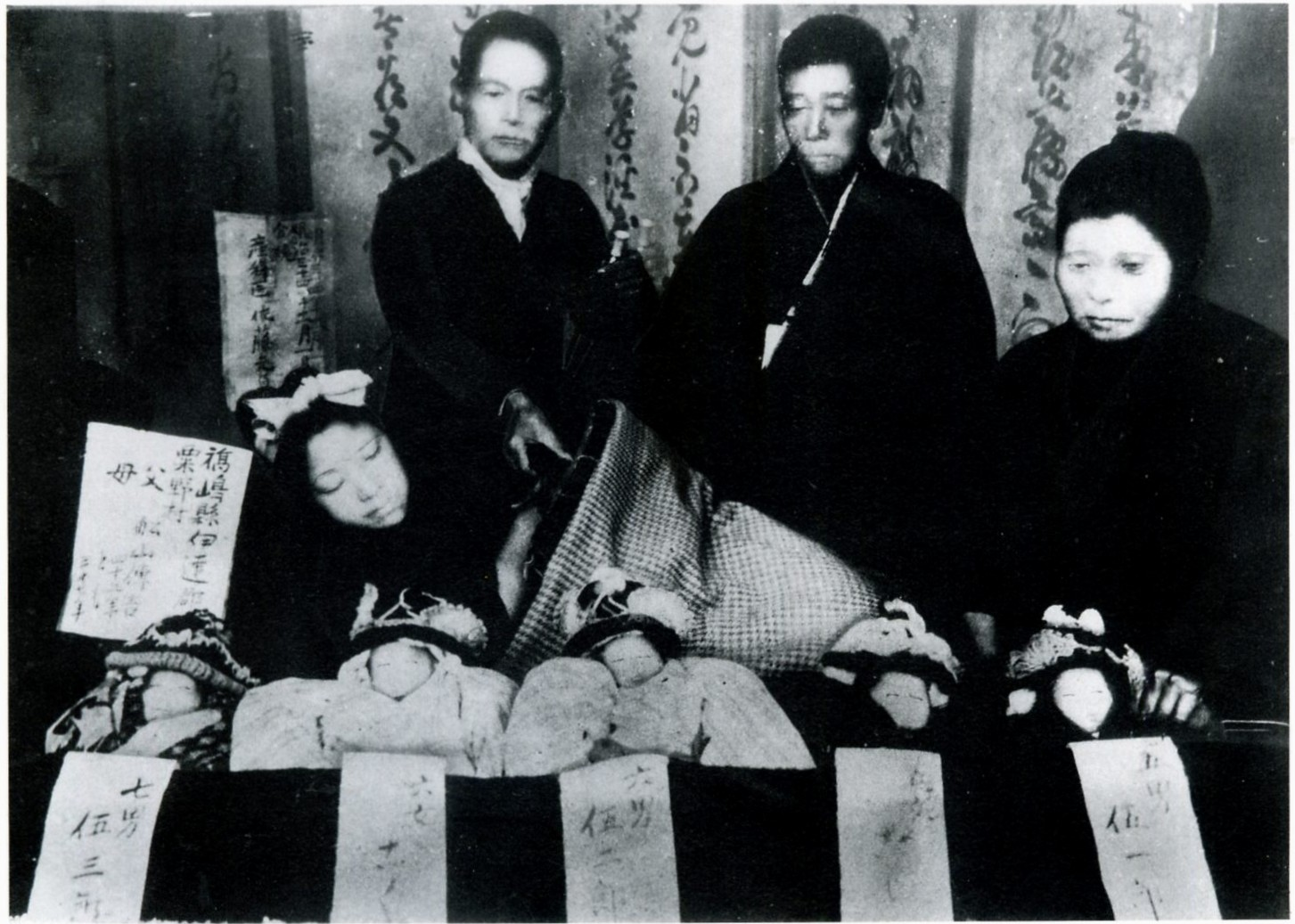 1901年11月1日、福島県伊達郡粟野村(現・伊達市)で生まれた五つ子。 後方中央は父(当時42歳)、横になっているのが母(当時37歳)で、三男二女の誕生で一挙に13人の子持ちとなった。撮影者は隣の保原町に住んでおり、五つ子誕生の騒ぎを聞きつけ、わざわざ愛用の写真機を携えて訪ねた。